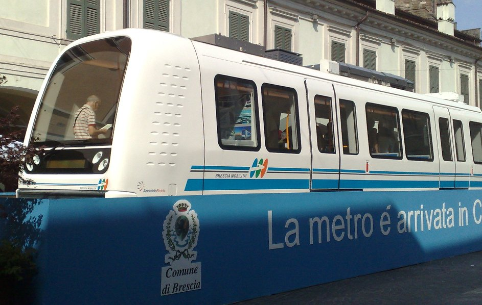 Esterno del vagone della Metro.bs in esposizione al pubblico nel giugno 2009 a Brescia.